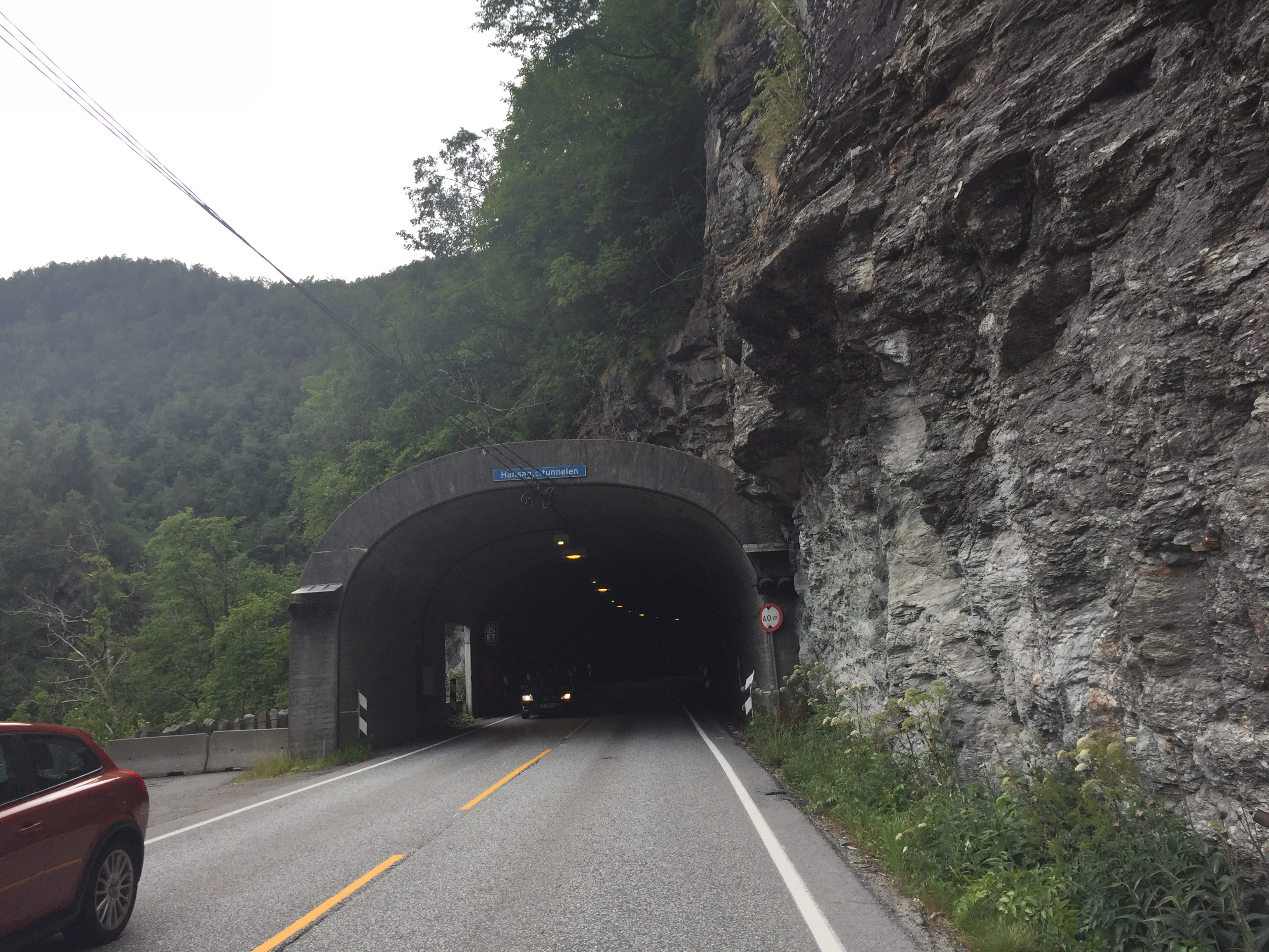 Hansagjeltunnelen